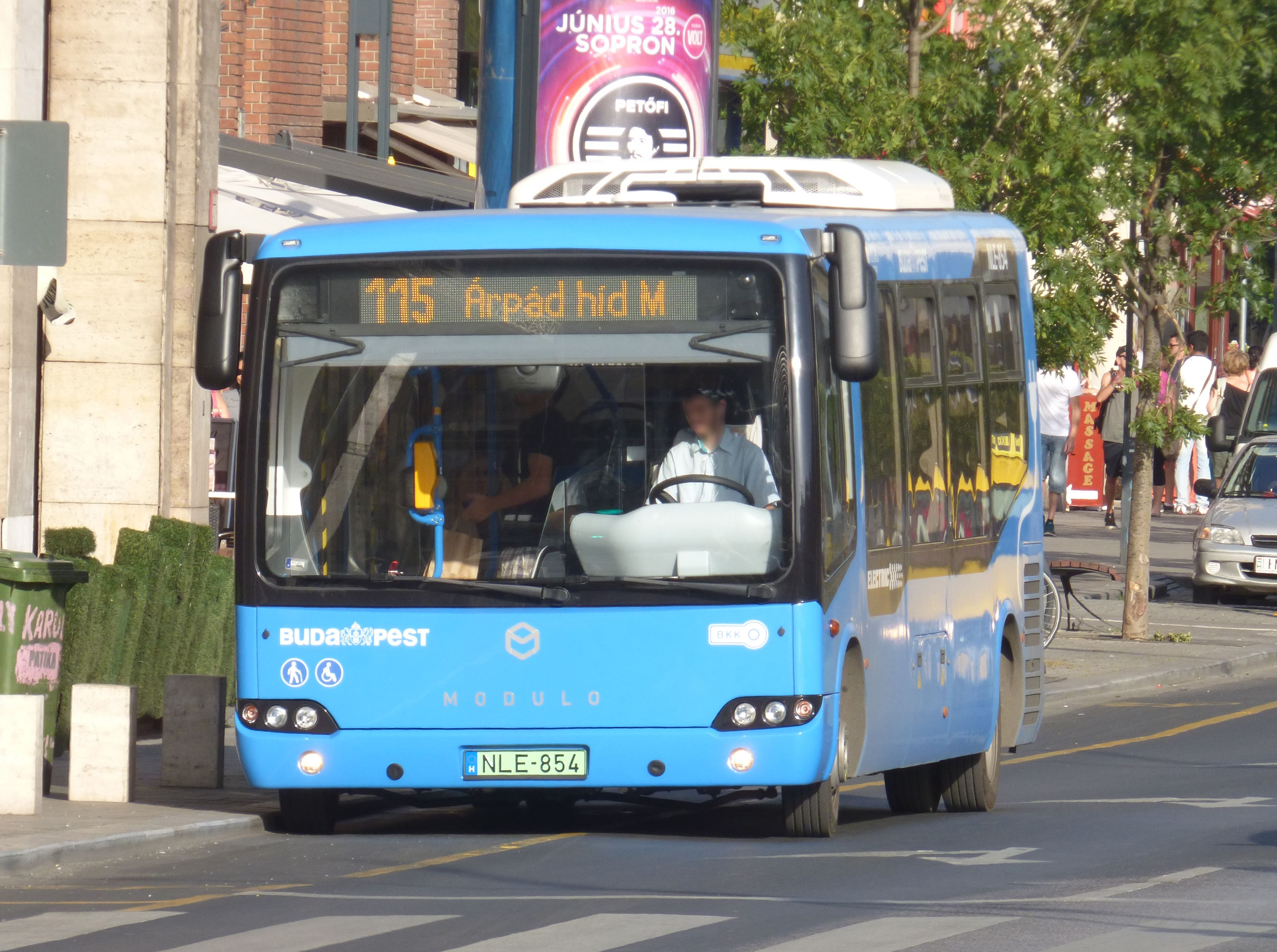 115-ös busz a Deák Ferenc téren